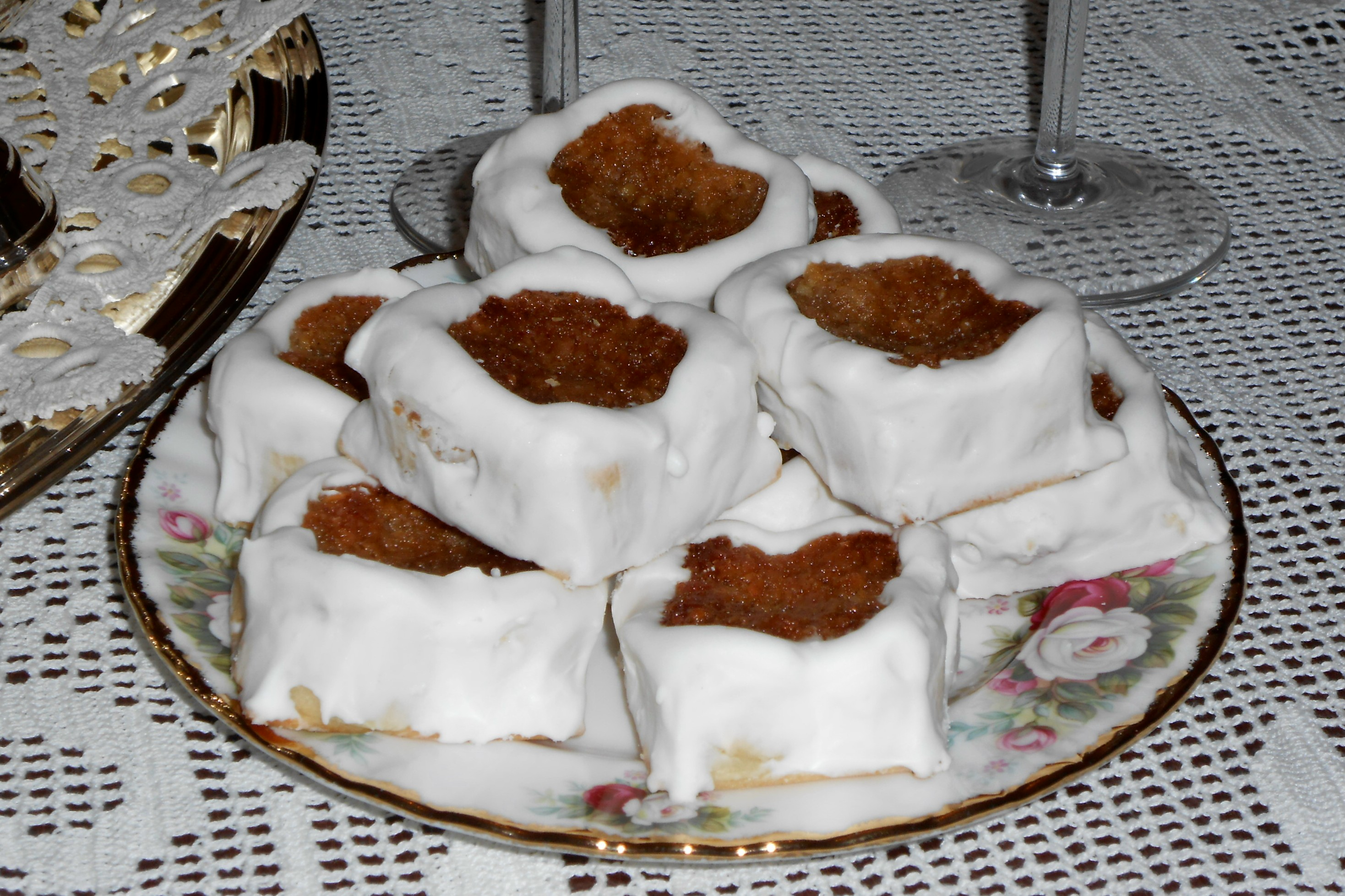 Le cassatelline di Militello. Dolce tipico con ripieno.